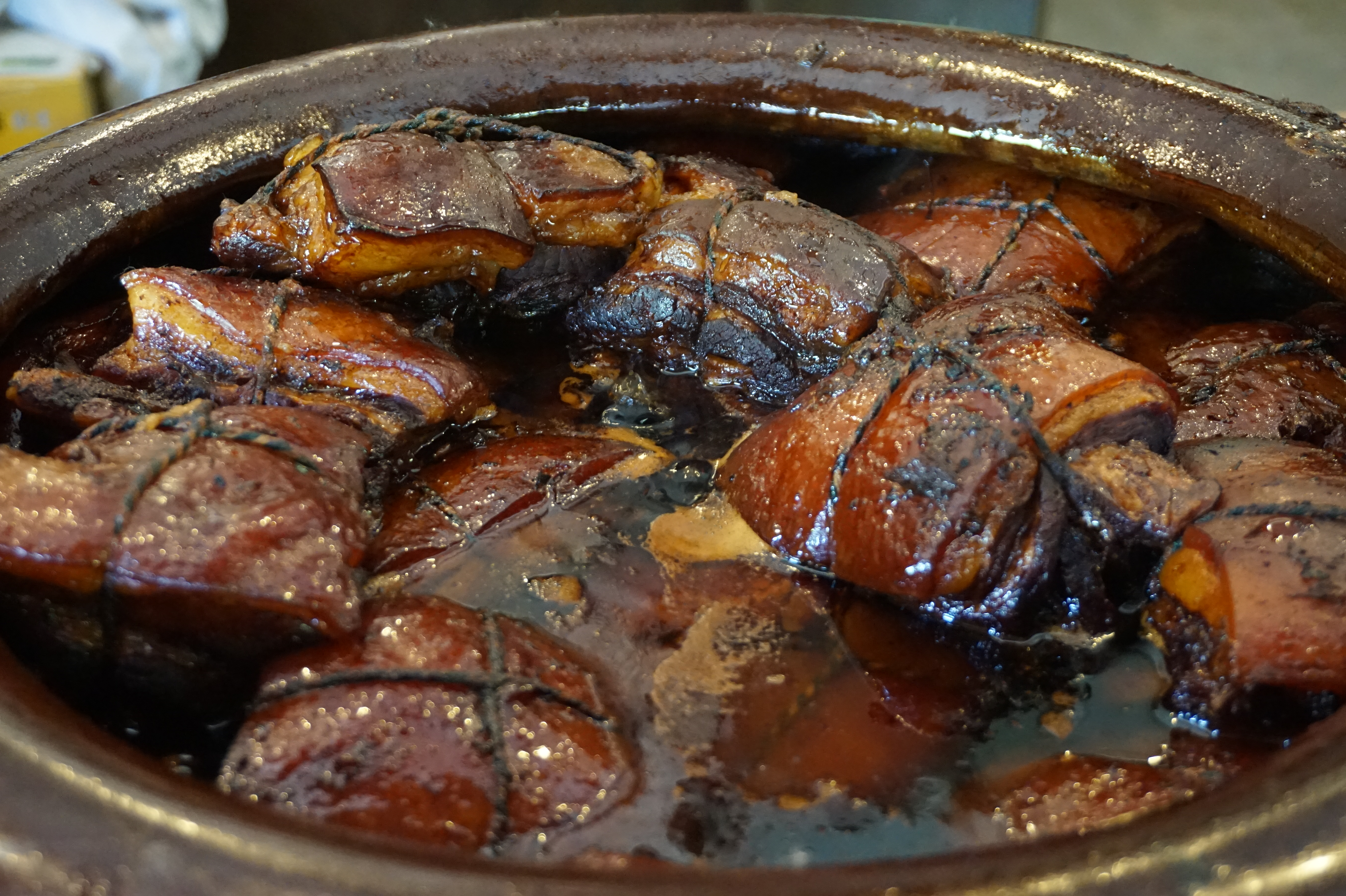 盐官缸肉。与东坡肉类似。